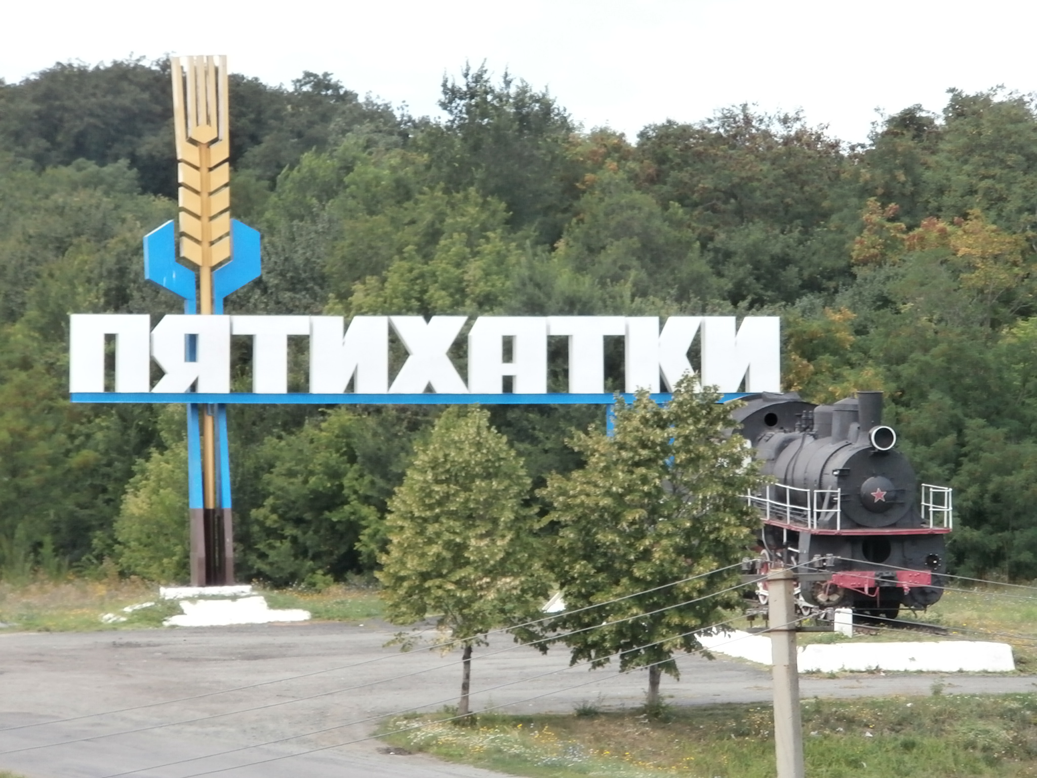 Ortseingang von Pjatychatky und Eisenbahn-Denkmal